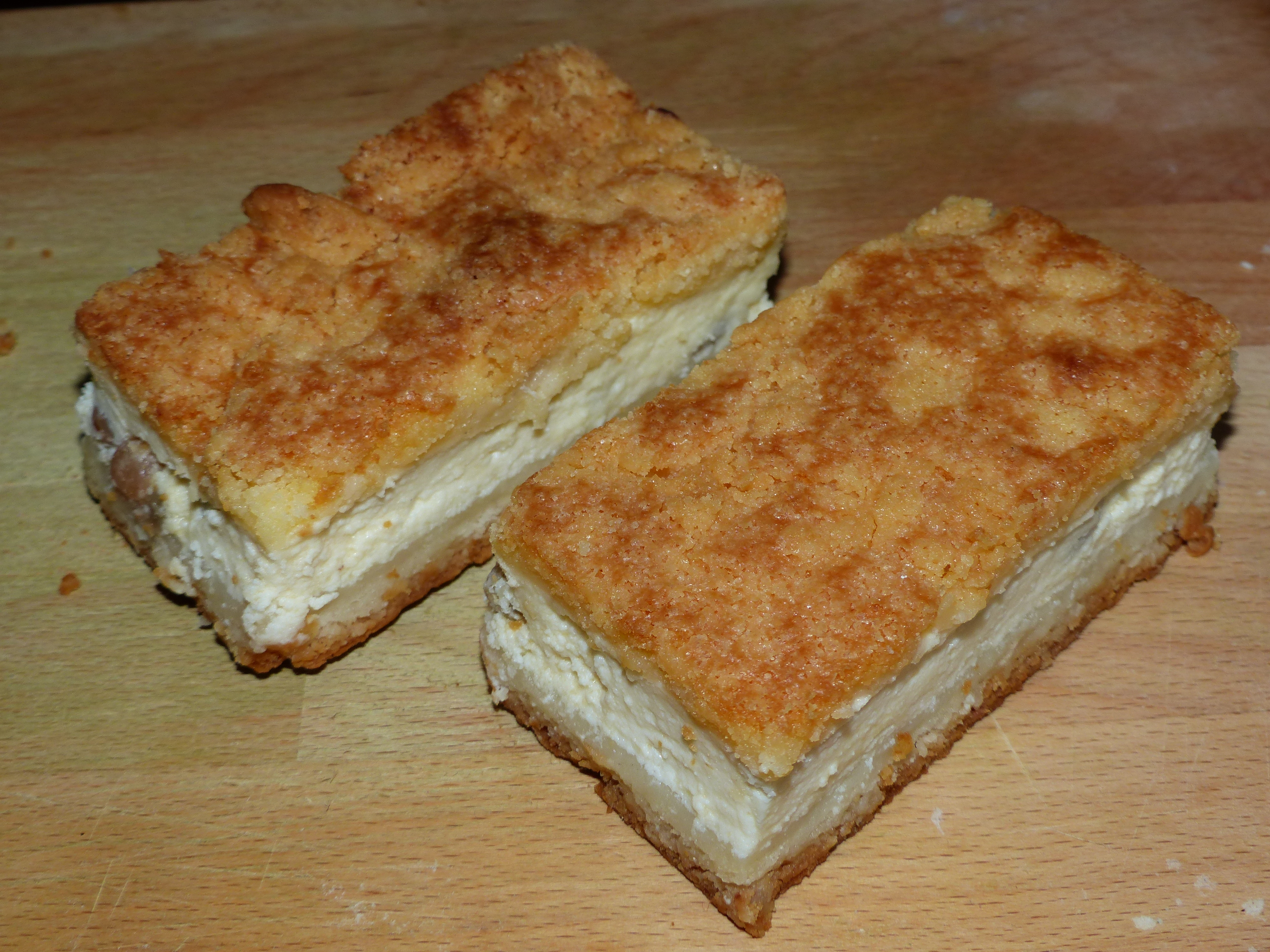 Kirmeskuchen in Dresden